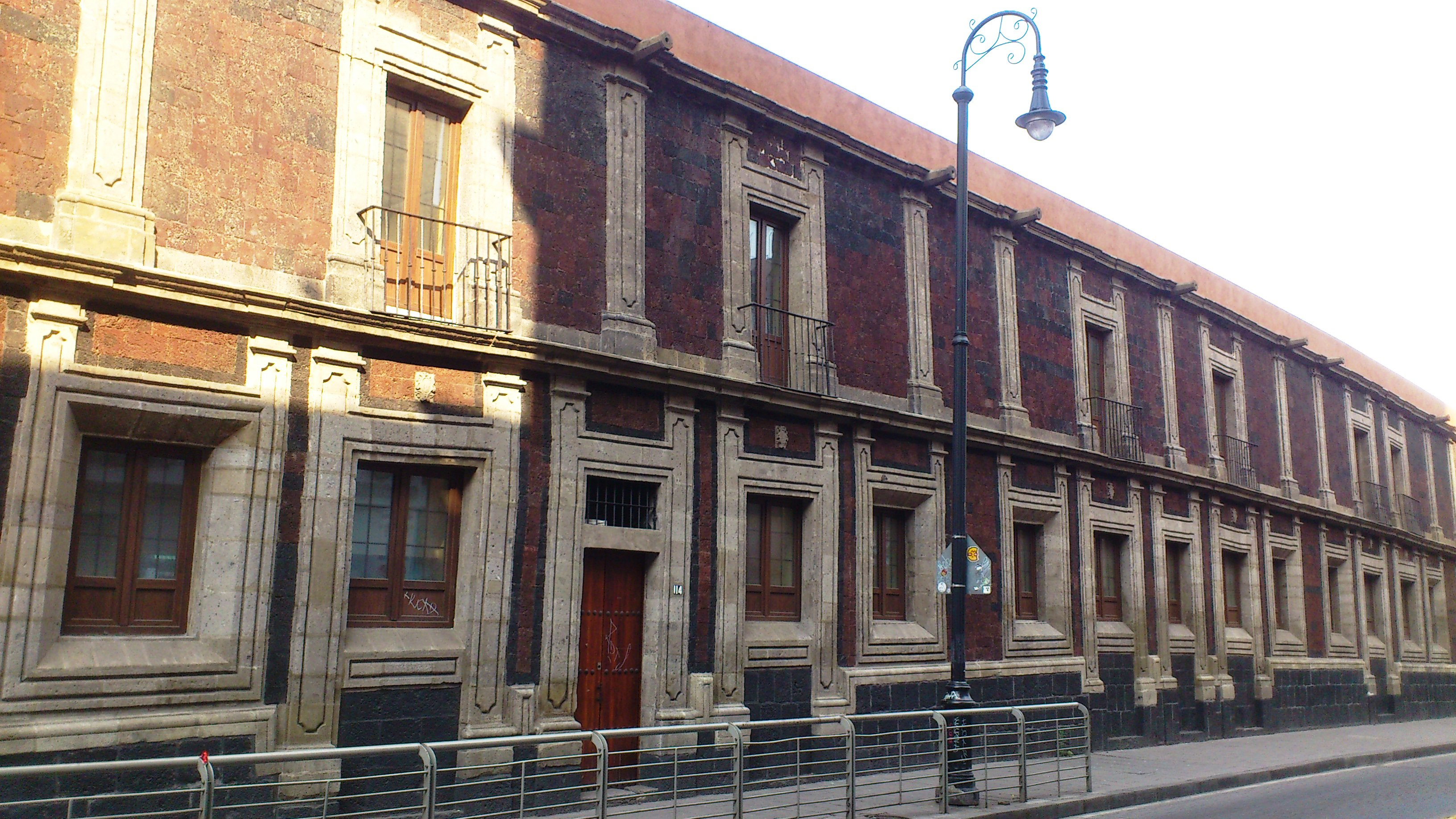 Fachada de la casa de las calderas en el centro histórico de la Ciudad de México